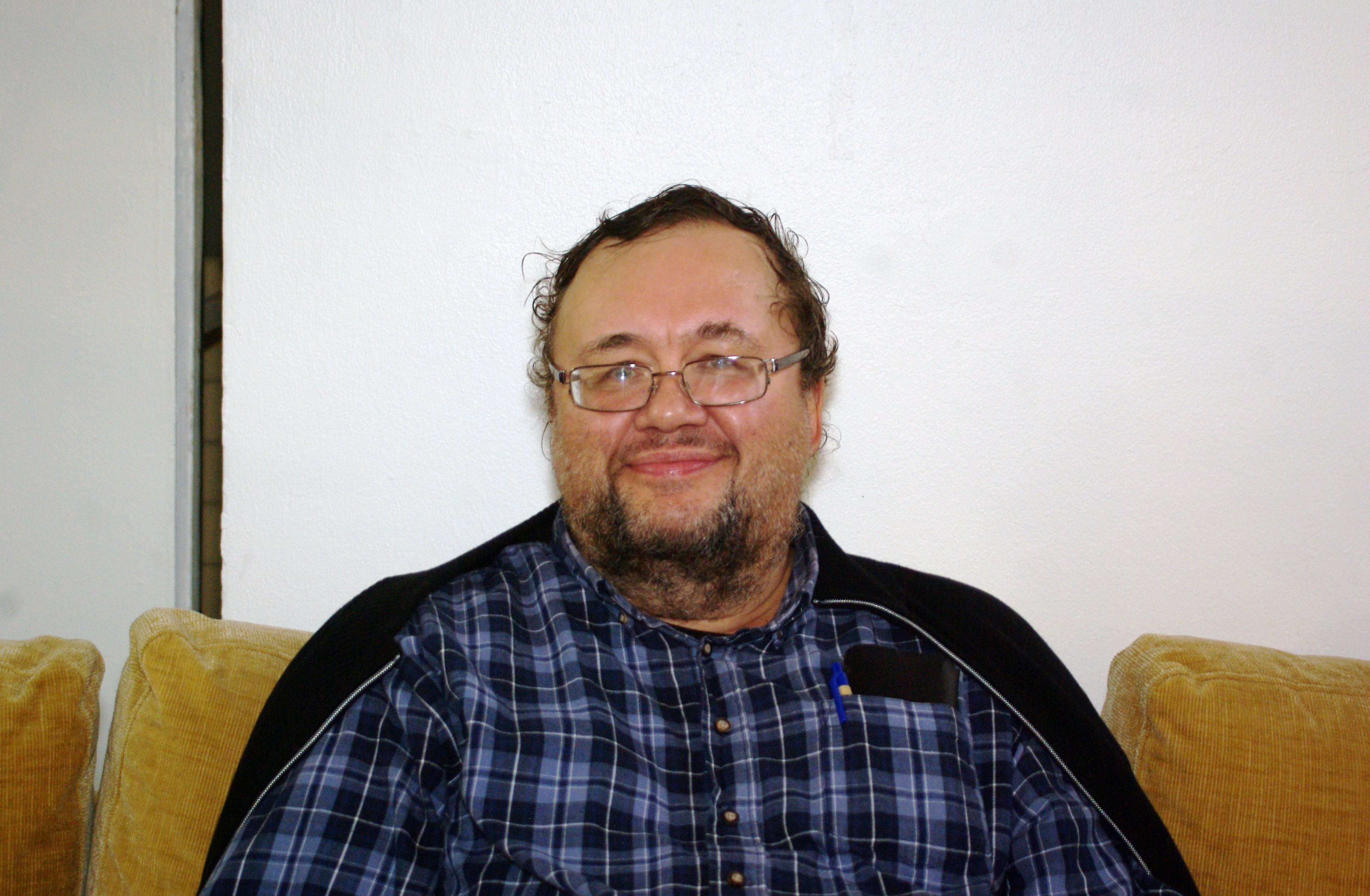 El escritor finlandés en lengua sueca Torsten Petterson en la Feria Internacional del Libro de Santiago 2015